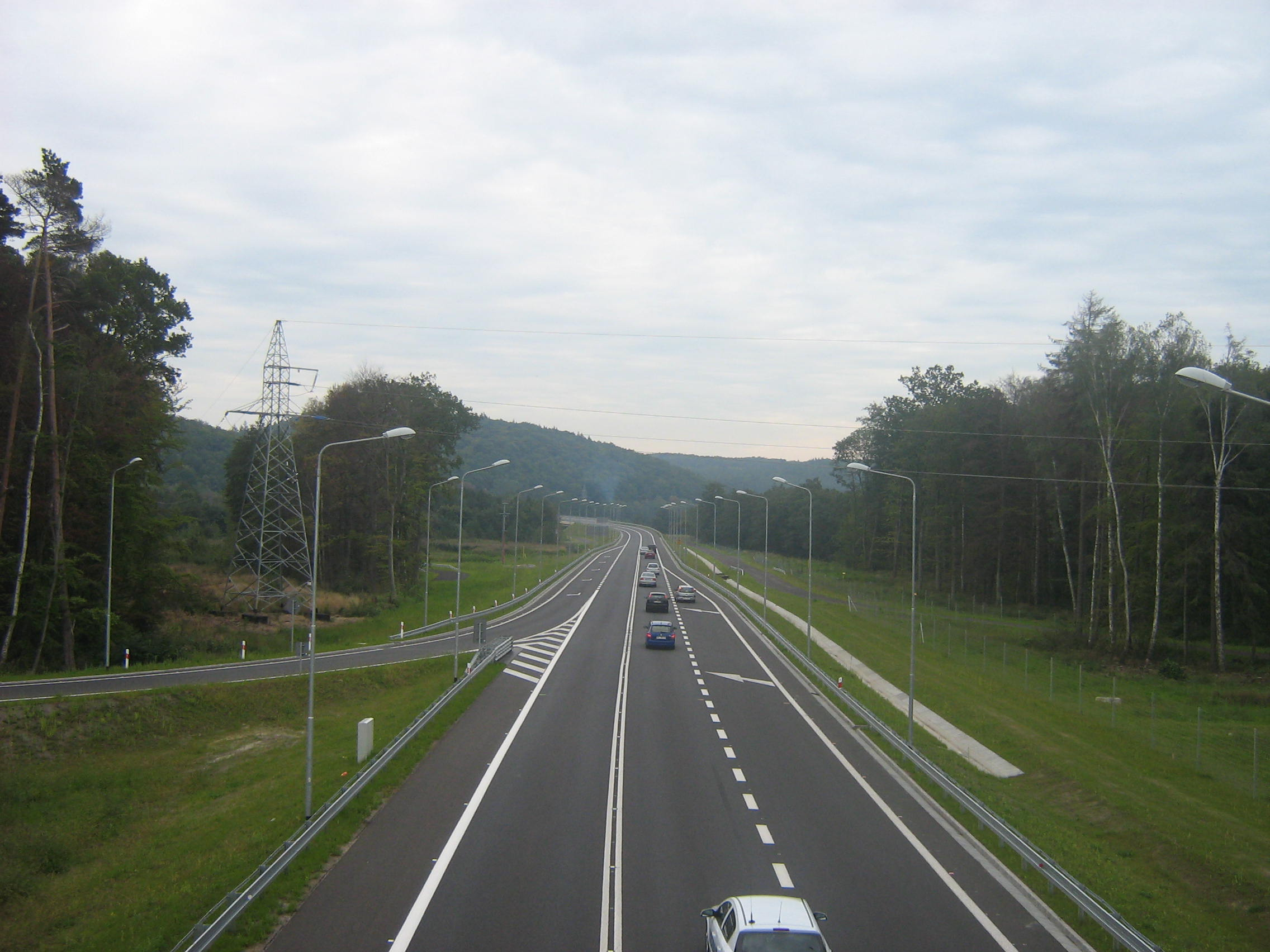 Droga krajowa nr 3 koło Międzyzdrojów.